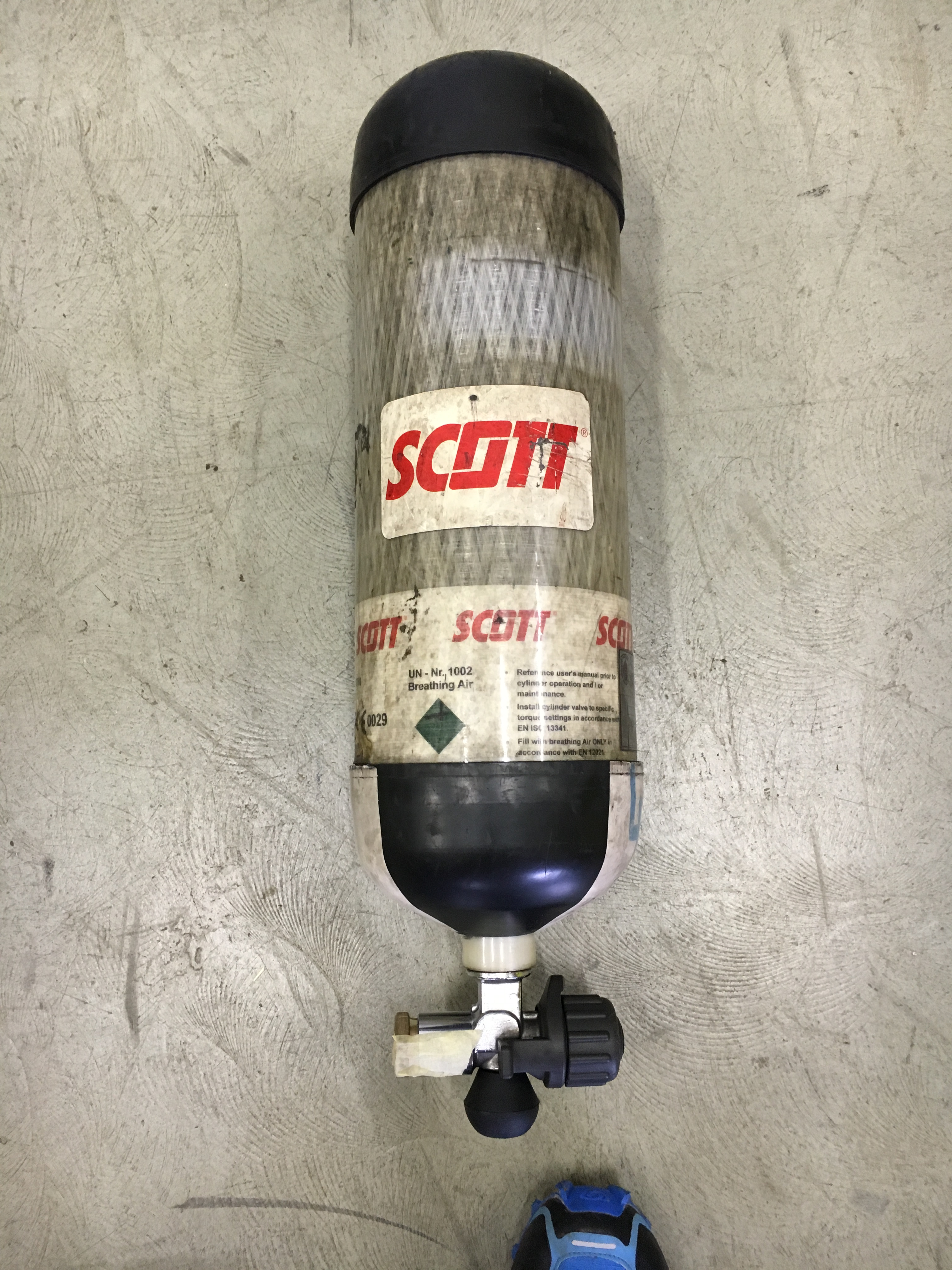 Tlačna posoda